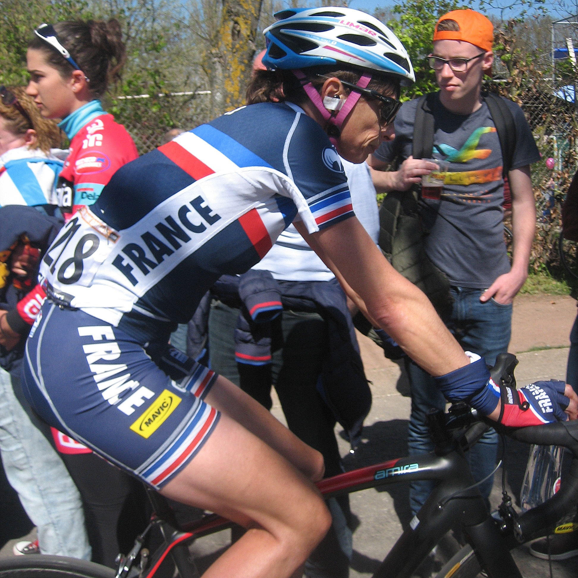 Edwige Pitel (Franse nationale ploeg) na finish Waalse Pijl 2016